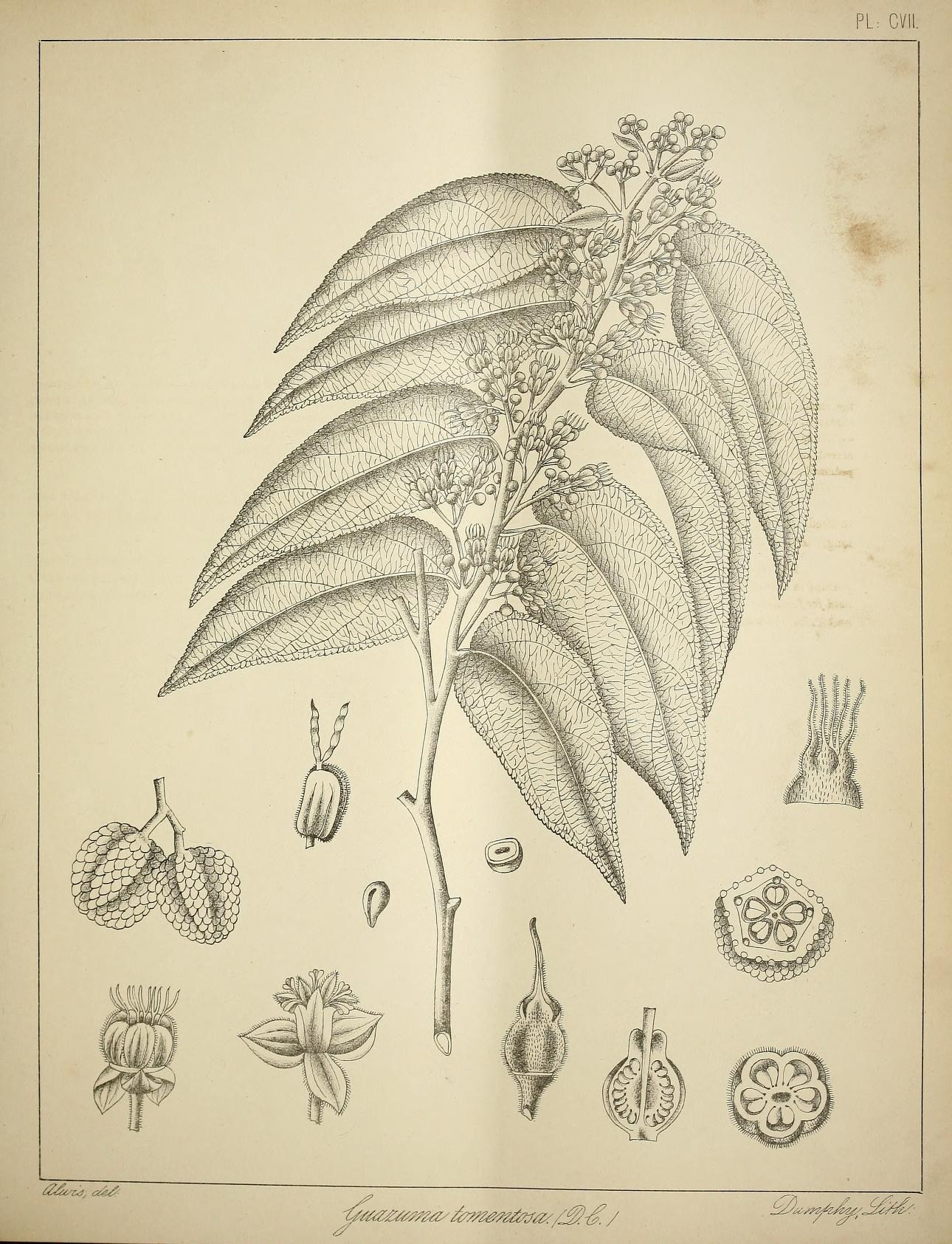 PL: '.'Z^) y .XAC. 6vm?zifr7a/ / &i£. /